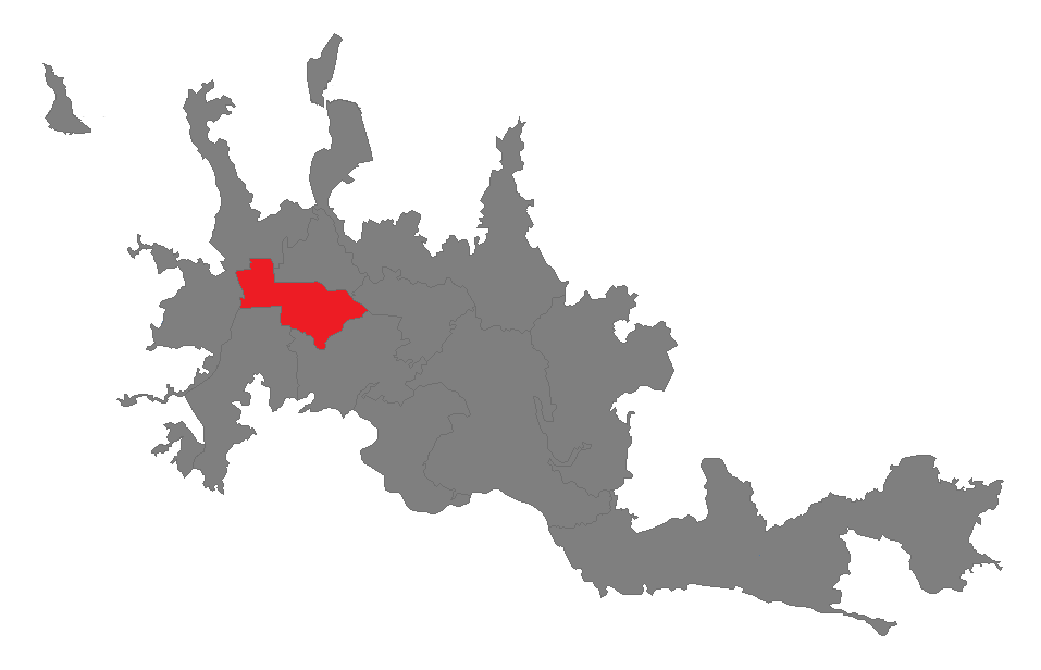 mapa de la ubicacion de la comuna cumanday de manizales